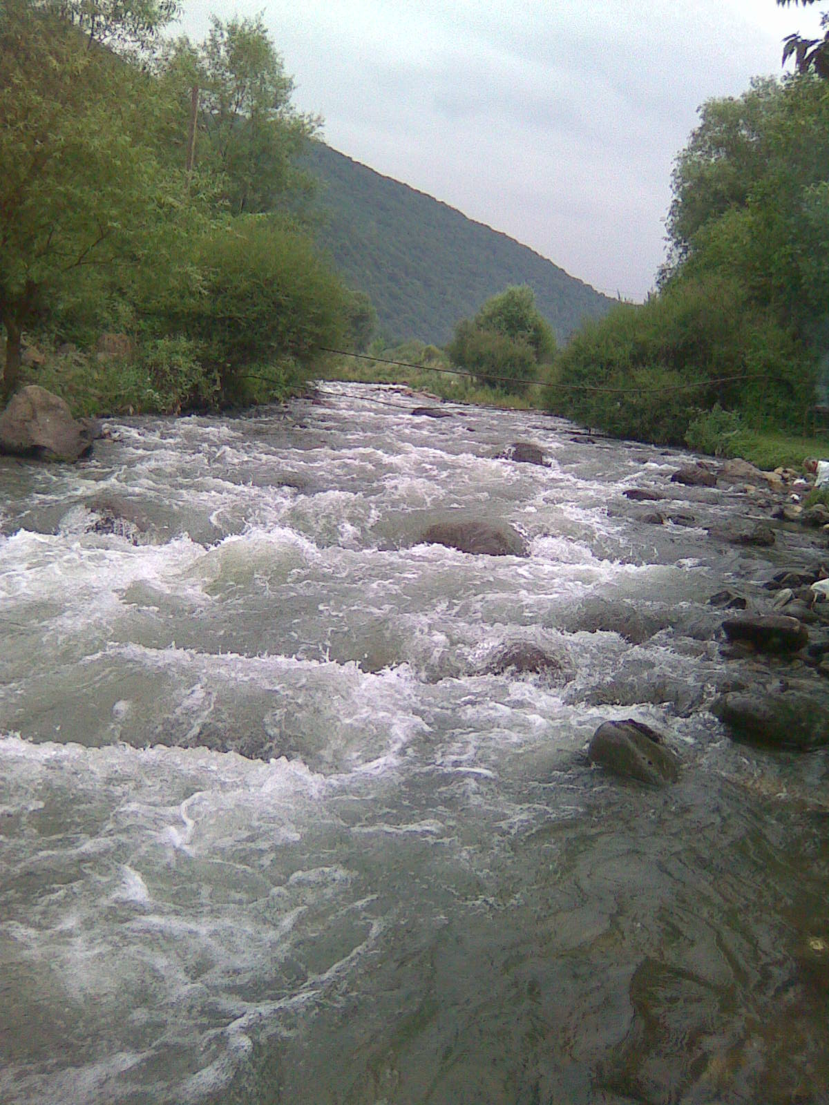 Azərbaycan , Kiçik Qafqaz dağları